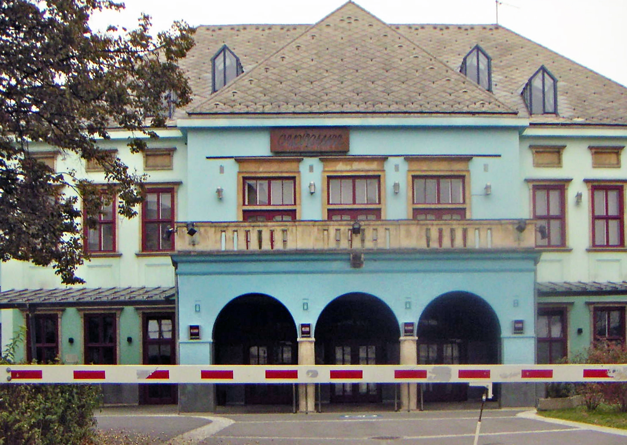 Graz, Orpheum (Oktober 2005)